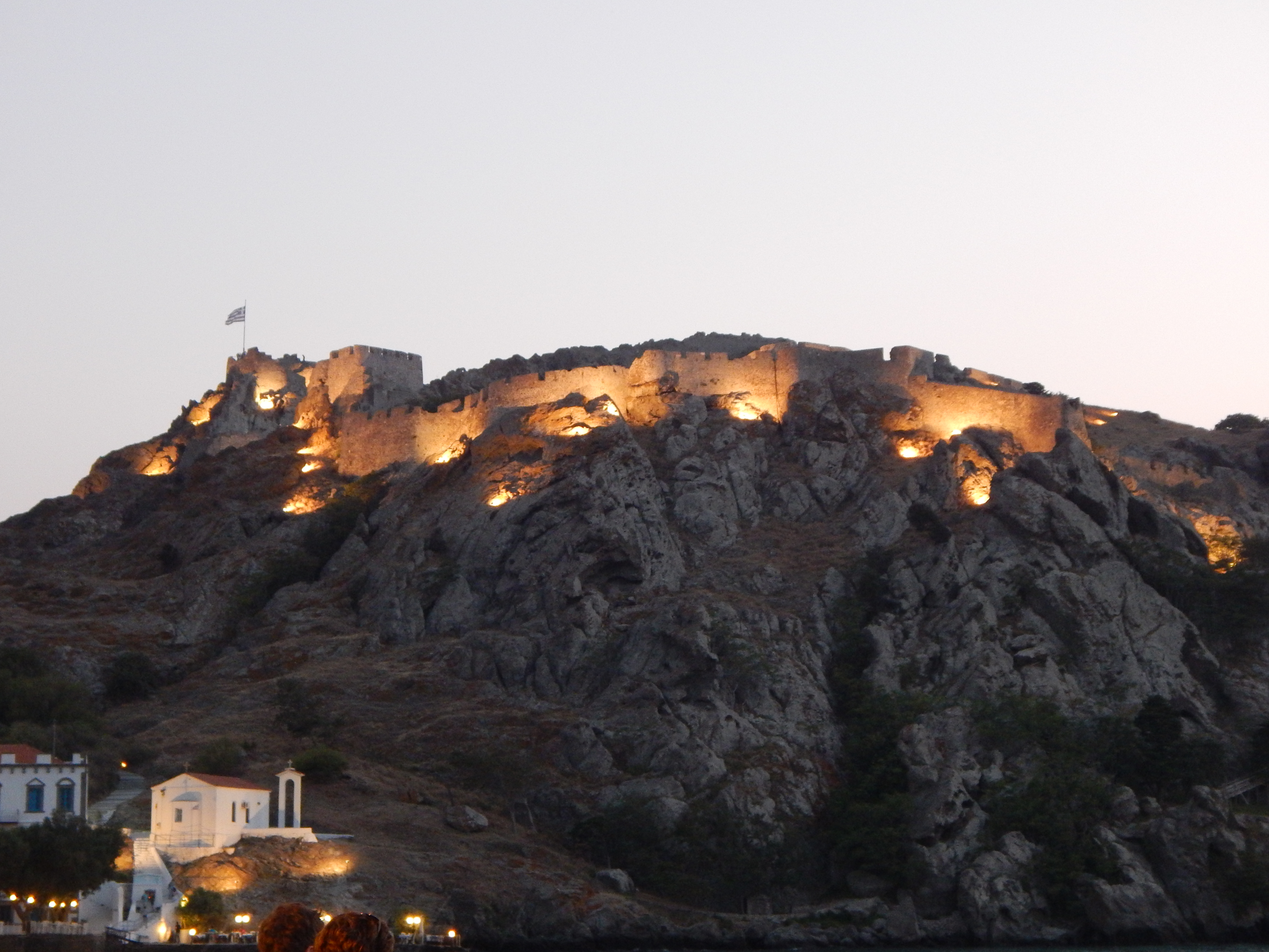 «Κάστρο Μύρινας»